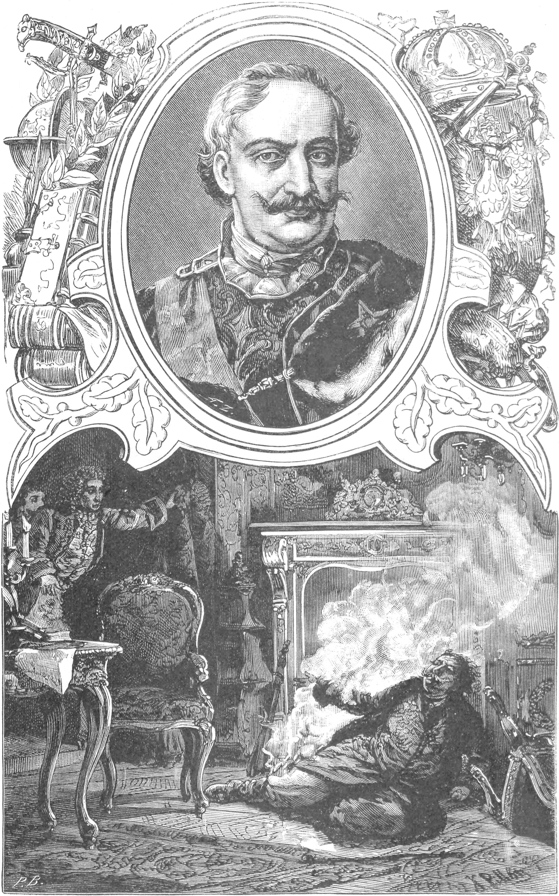 ilustracja z książki „Wizerunki książąt i królów polskich“